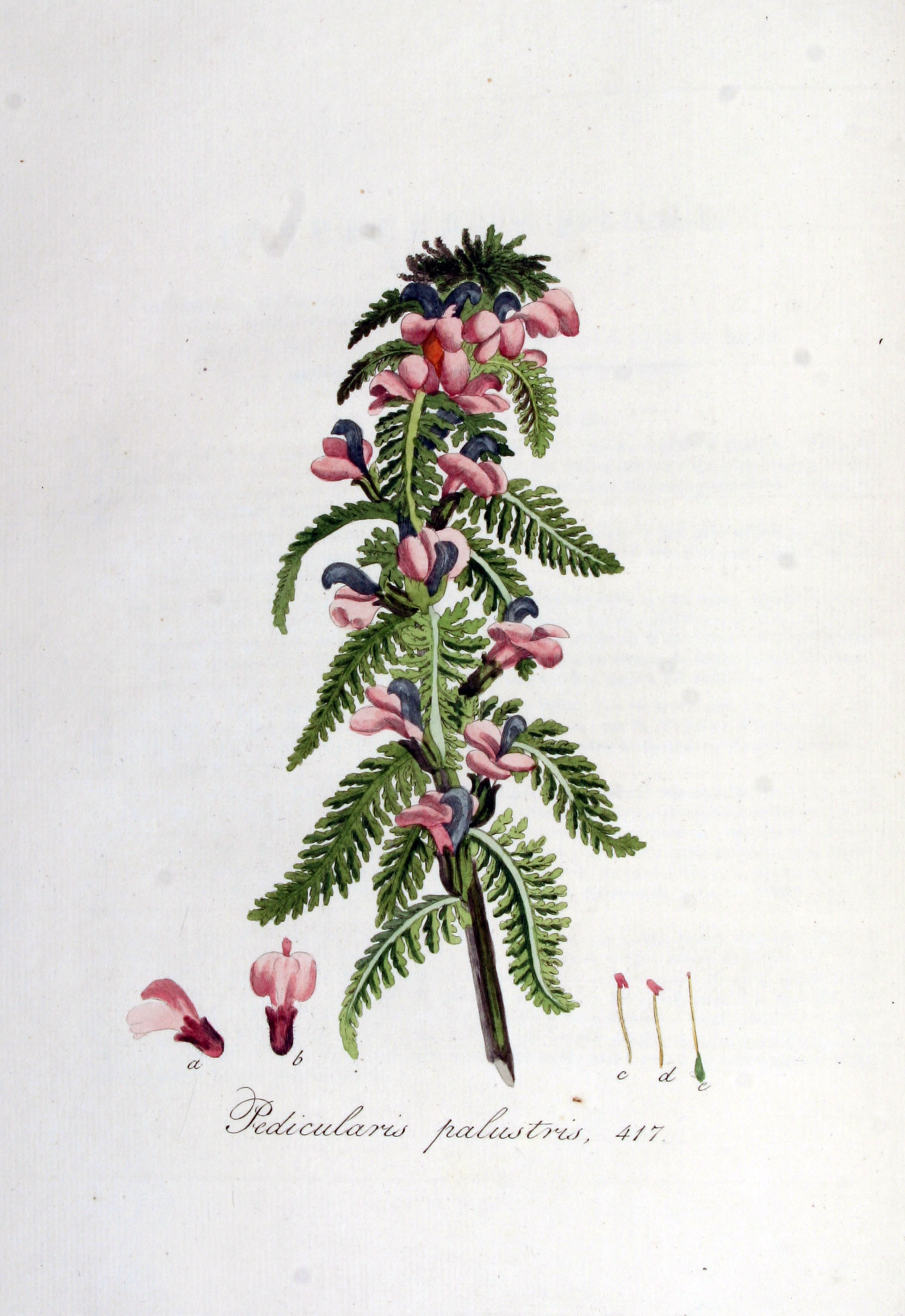 Pedicularis palustris L.